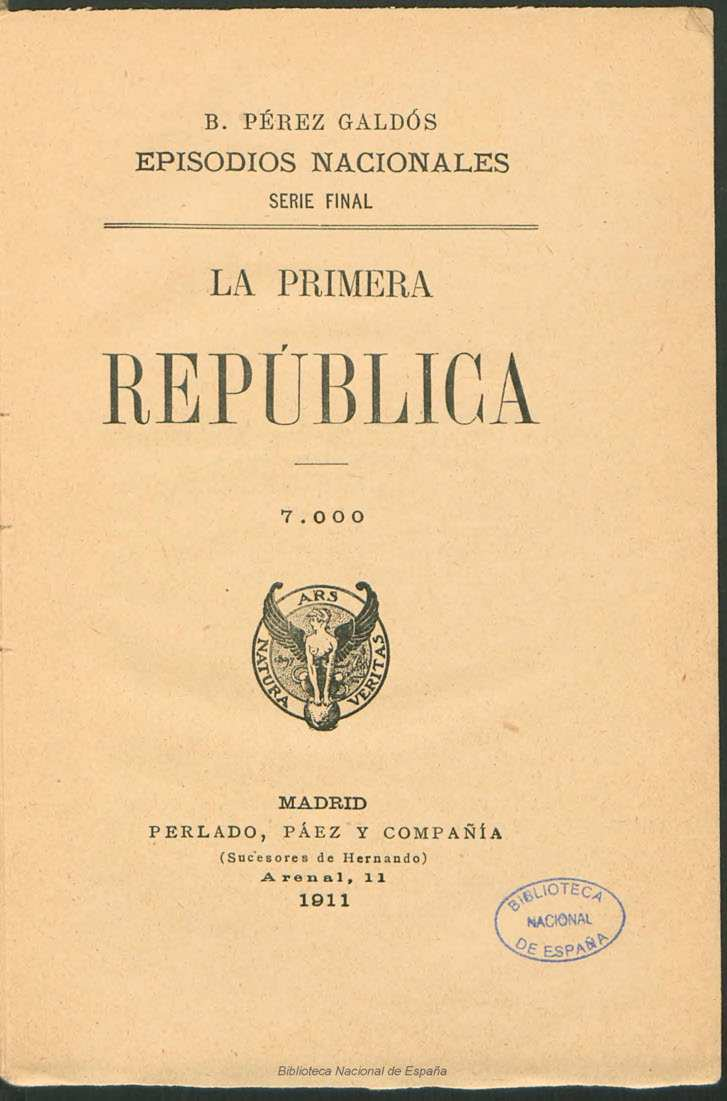 La Primera República Autor: Pérez Galdós, Benito (1843-1920) Fecha: 1911 Datos de edición: Madrid, Perlado, Páez y Compañía (Sucesores de Hernando)